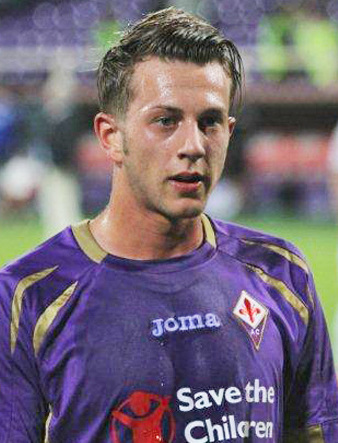 Federico Bernardeschi (Carrara, 16 febbraio 1994) è un calciatore italiano, attaccante della Fiorentina, e della Nazionale Under-21 italiana. (from it.wp)